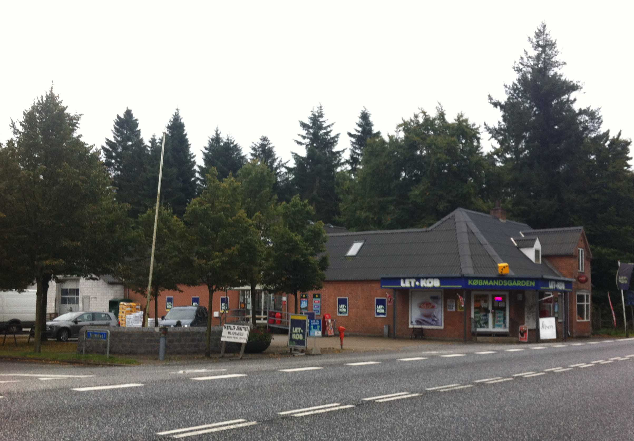 Købmanden i Hjøllund